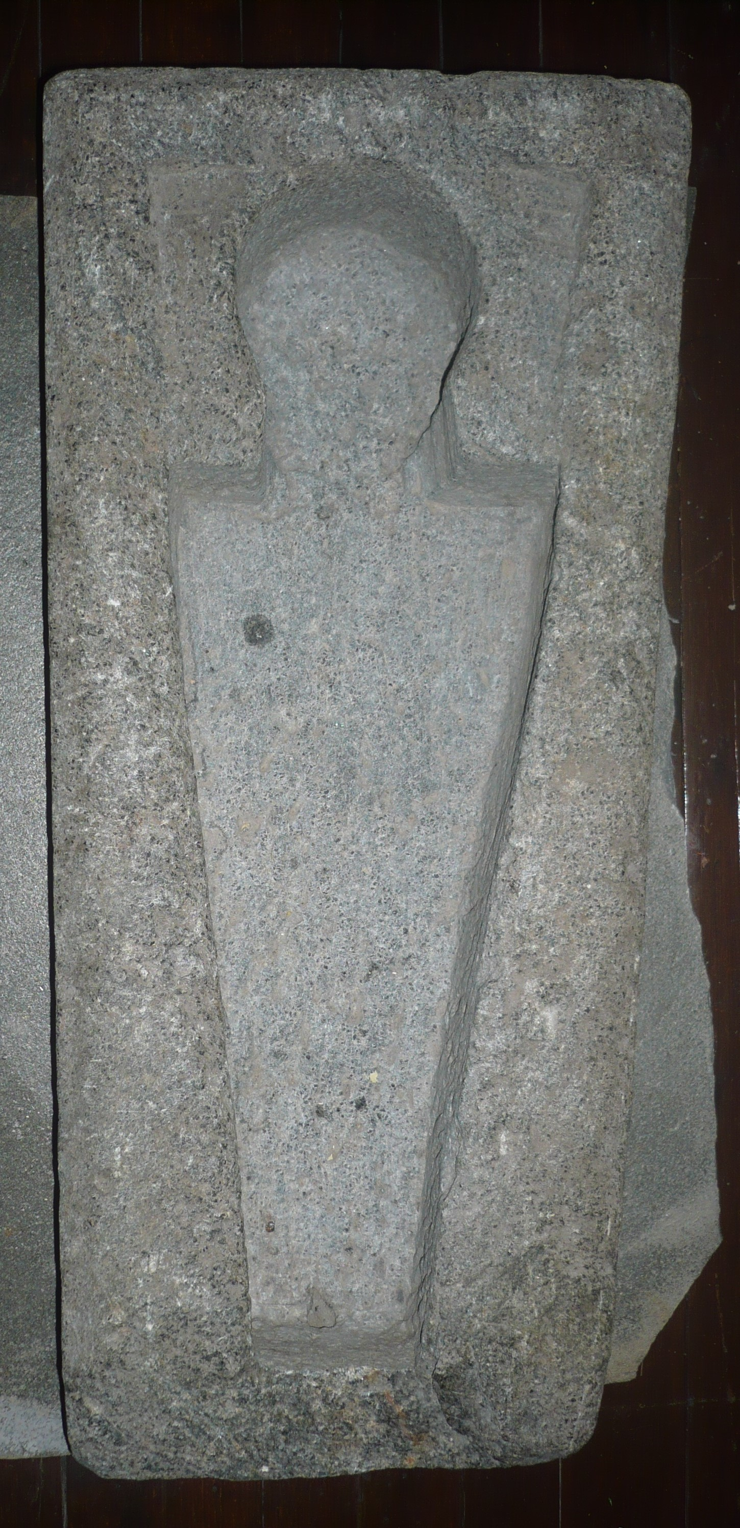 Barnekiste fra Mariakirken i Stavanger, fra middelalderen. Originalen er på Stavanger Museum.